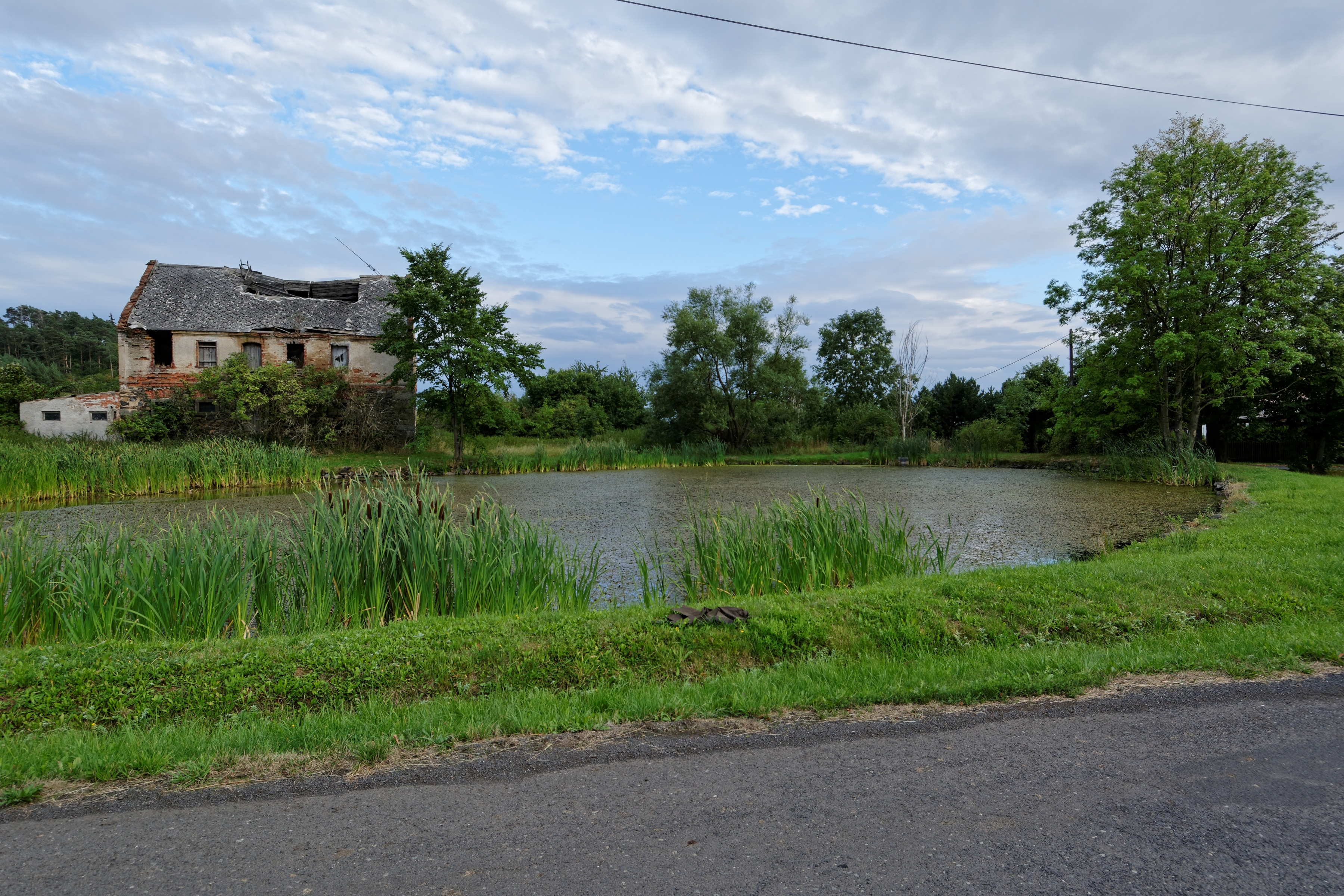 Záhoří u Verušiček, rybník v centru obce.